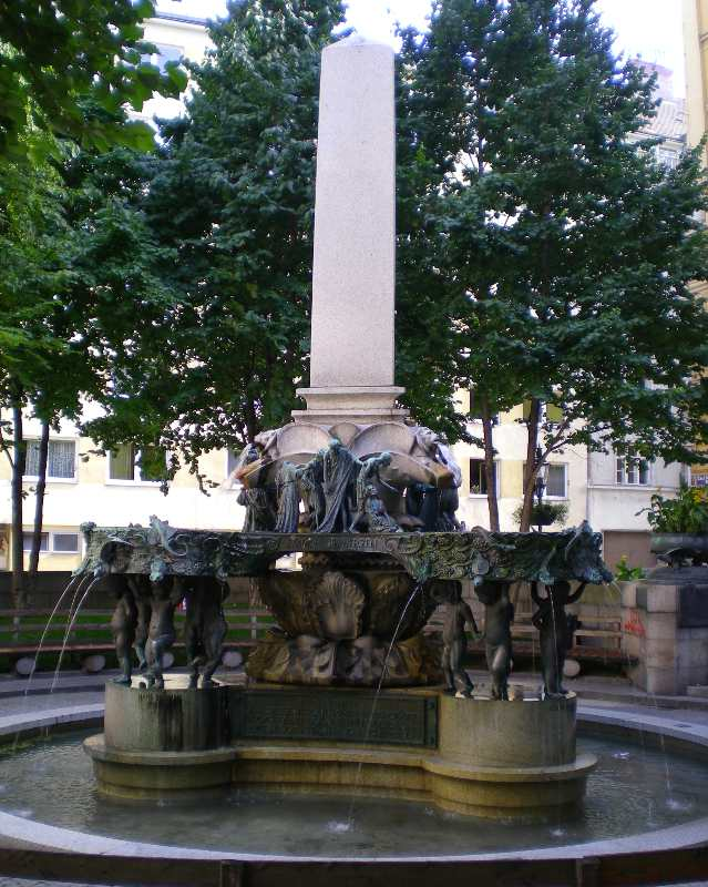 Der Karl-Borromäus-Brunnen von Josef Engelhart auf dem Karl-Borromäus-Platz in Wien-Landstraße anlässlich des 60. Geburtstags des Bürgermeisters Karl Lueger